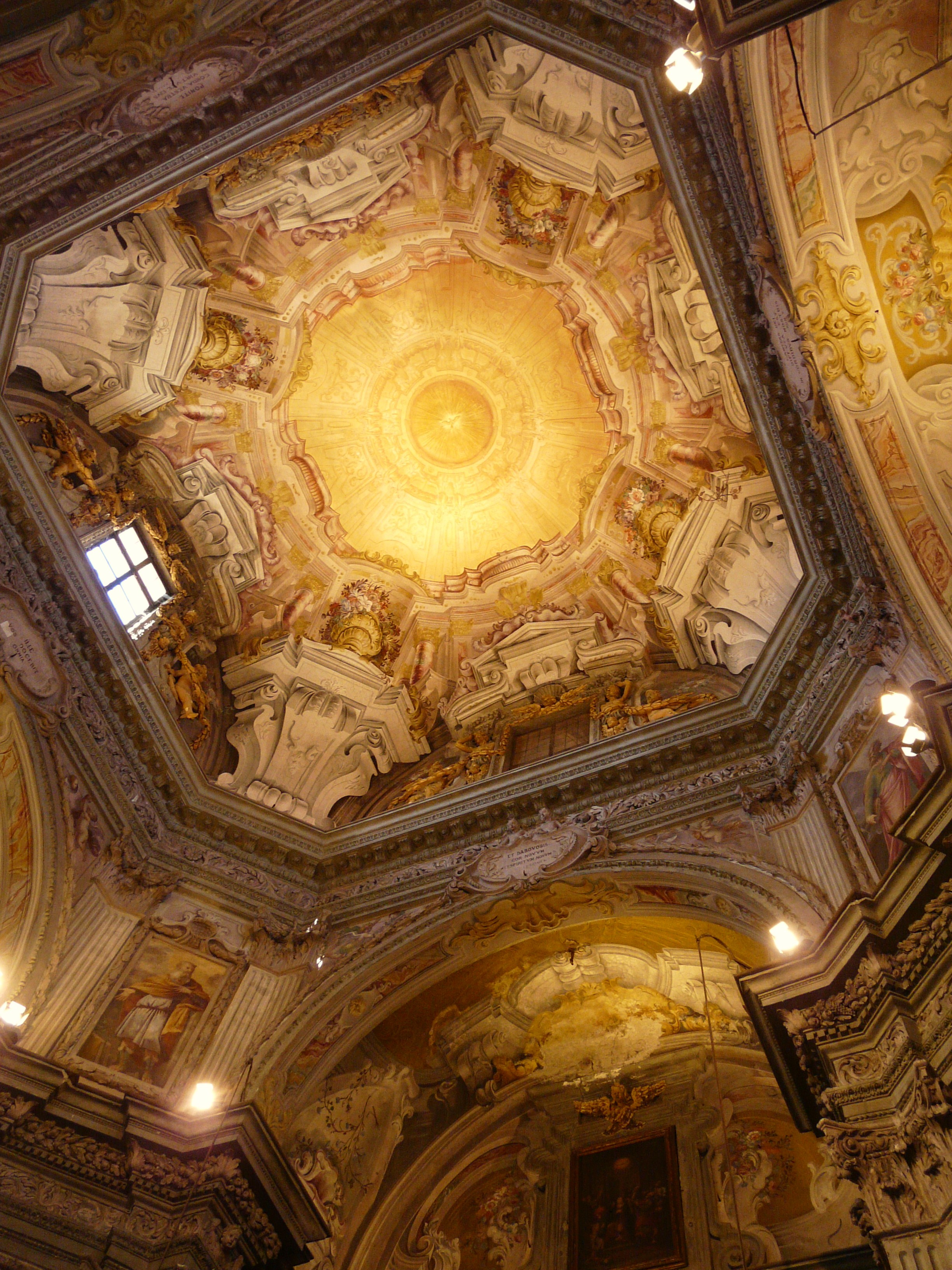 Soffitto della chiesa dei Battuti Bianchi, Carignano, Piemonte, Italia